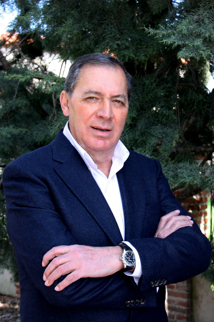 Periodista y escritor español José MIguel Ortega Bariego